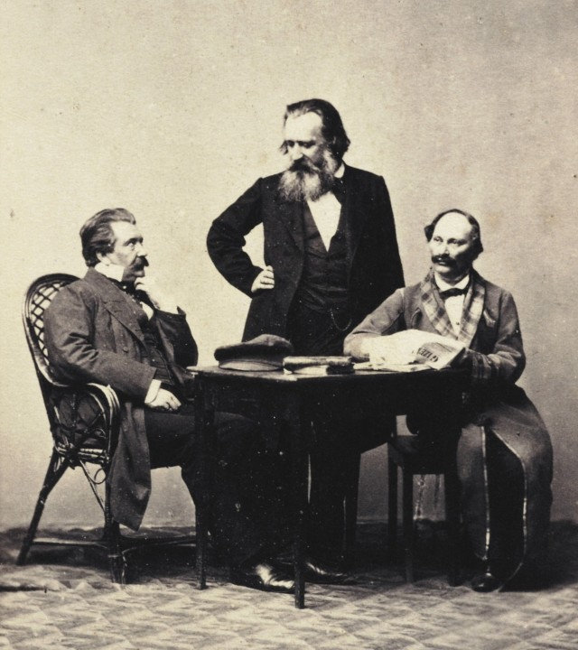 Ksawery Szlenkier, Karol Beyer, Jakub Piotrkowski